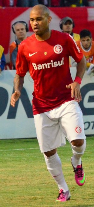 Gabriel em ação pelo Inter em 2013